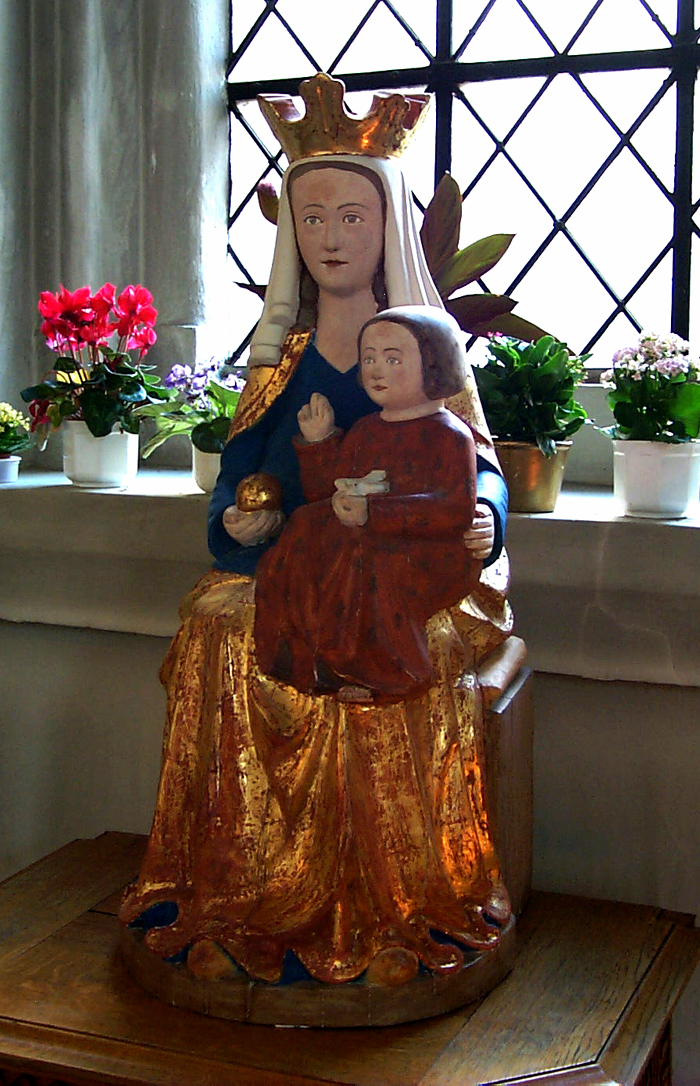 S:t Petri kyrka i Malmö. Kopia av Madonna från 1300-talet.